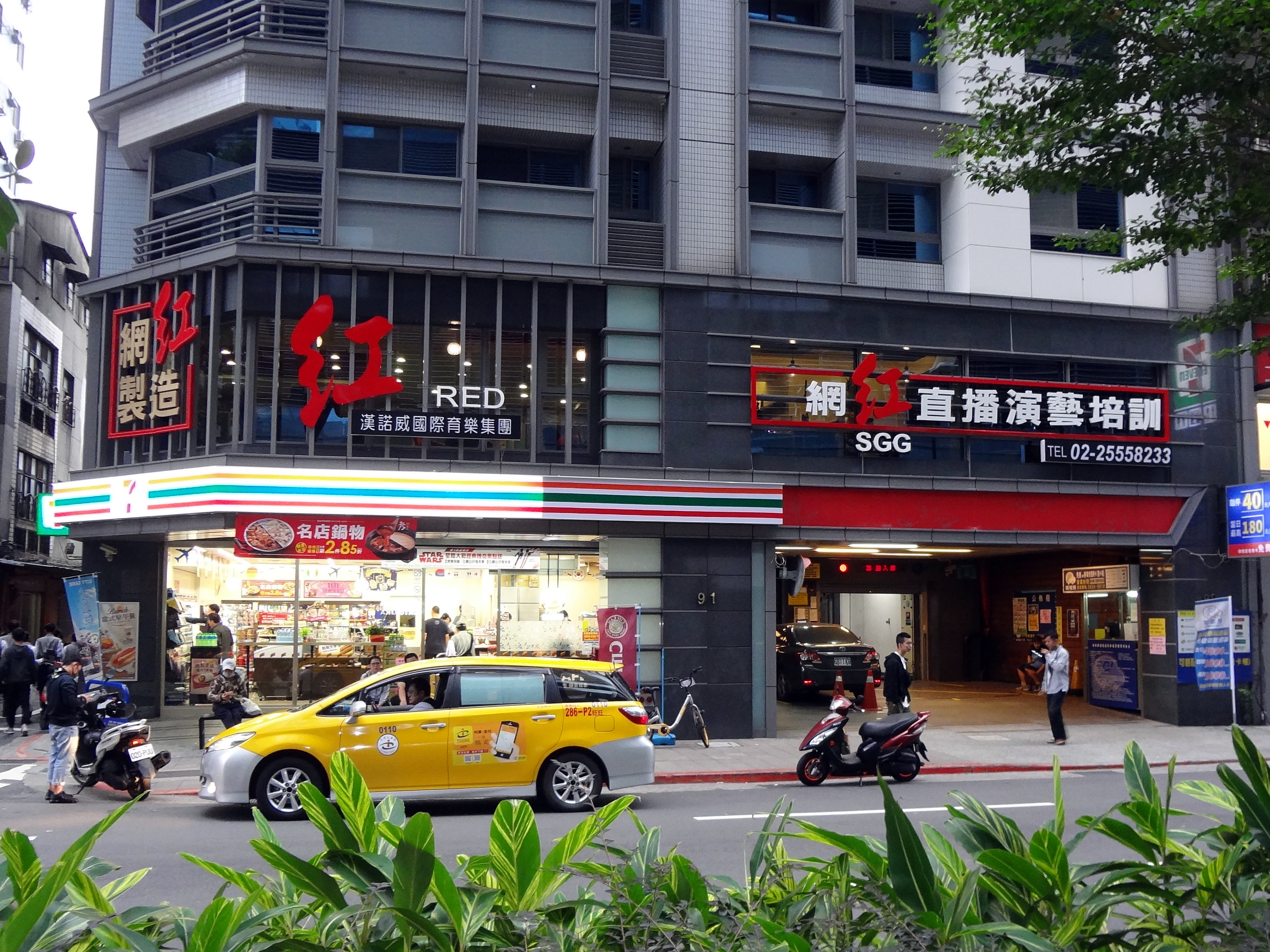 網紅製造直播演藝培訓公司，由漢諾威國際育樂集團董事長許安進投資成立，2017年6月17日開幕，位於臺北市大同區華陰街91號。